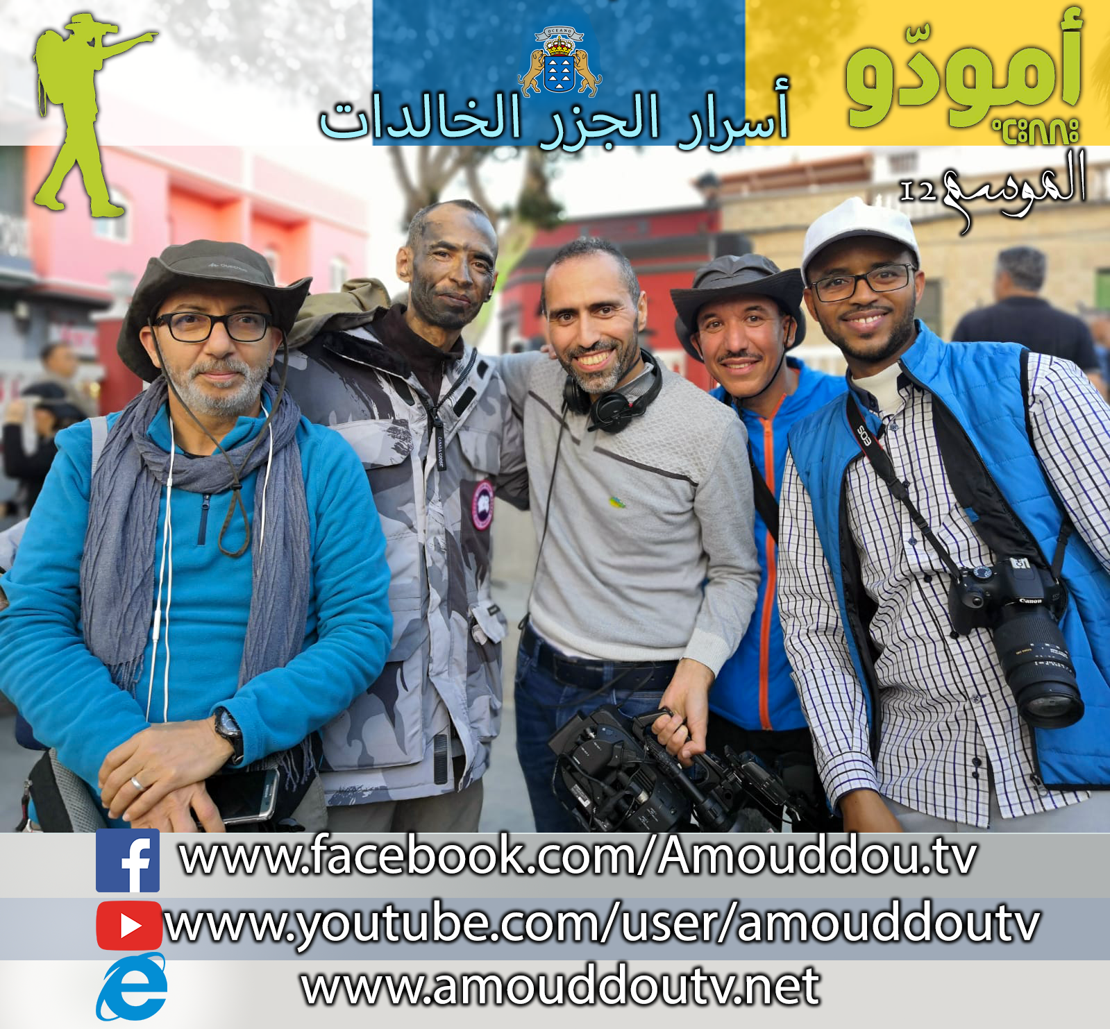 lors du festival traditionnel de La Aldéa, l'équipe Amouddou s'est déplacée pour filmer ces activités ancestrales.